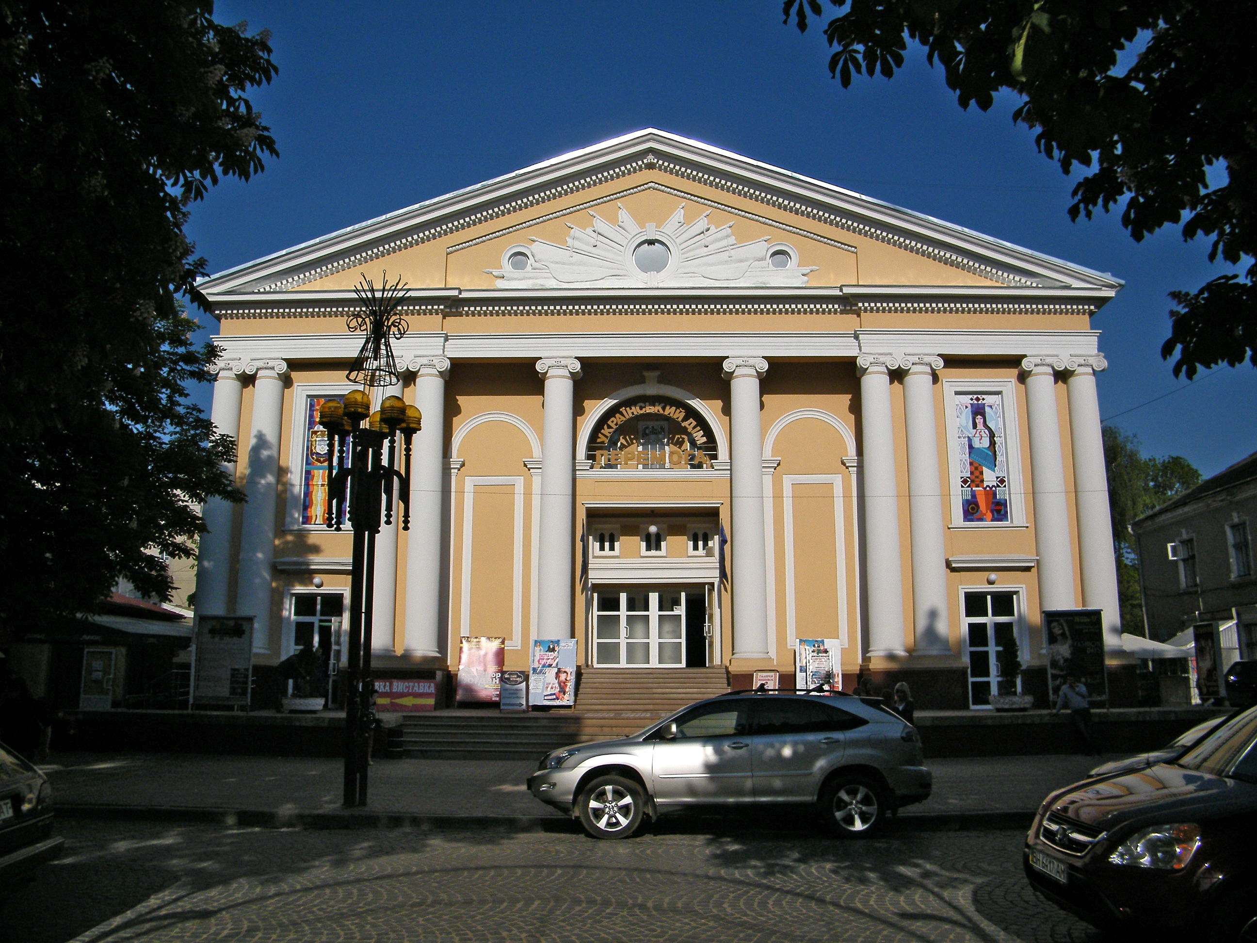 Украинский Дом - Победа